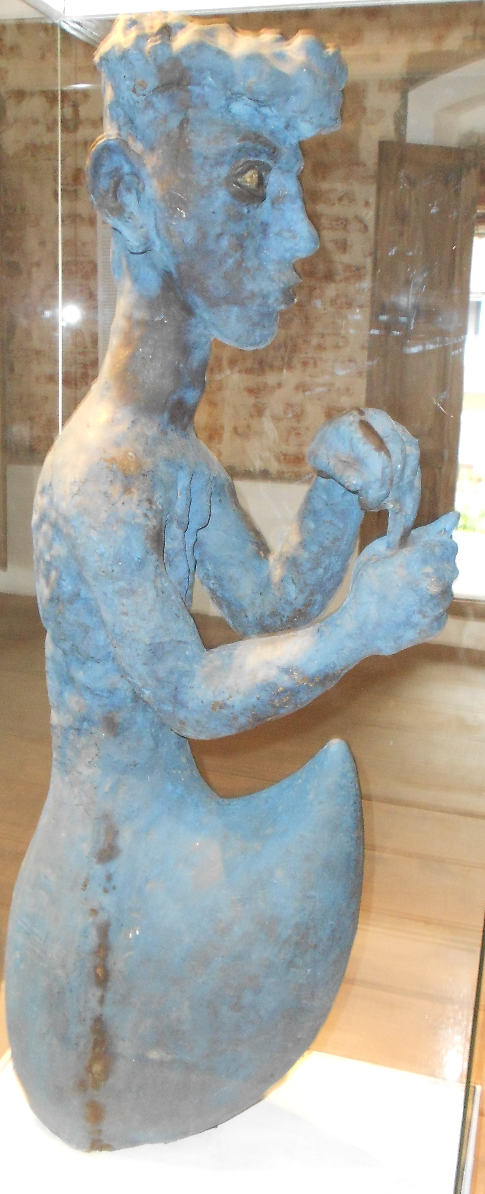 കെ.പി. കൃഷ്ണകുമാറിന്റെ ബോട്ട്മാൻ എന്ന പ്രശസ്ത ശിൽപ്പം